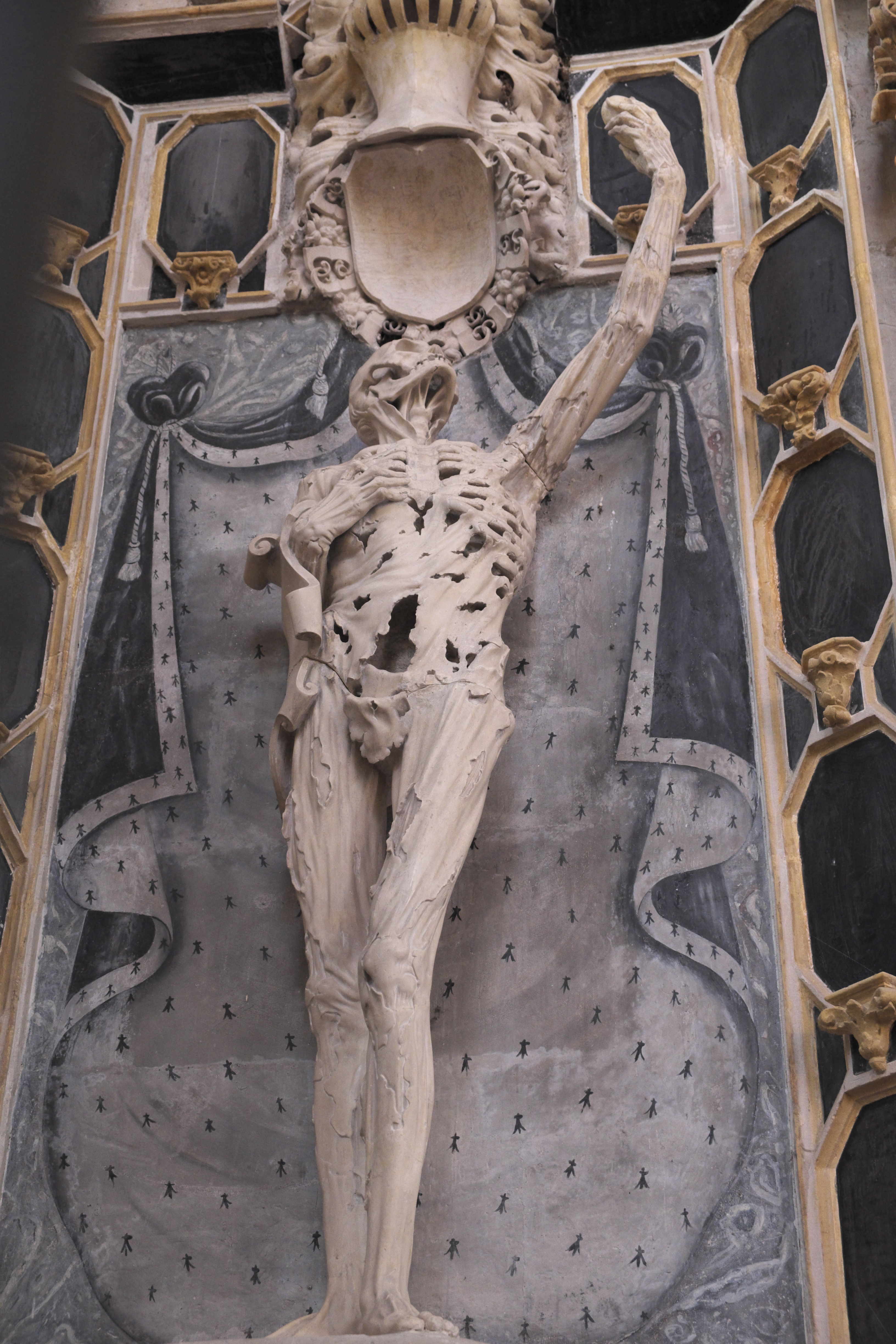 Katholische Kirche Saint-Étienne, ehemalige Kollegiatkirche, in Bar-le-Duc im Département Meuse (Lothringen/Frankreich), Skulptur von Ligier Richer, 16. Jahrhundert; Darstellung: Transi de René de Chalon (Leichnam von René de Chalon) .